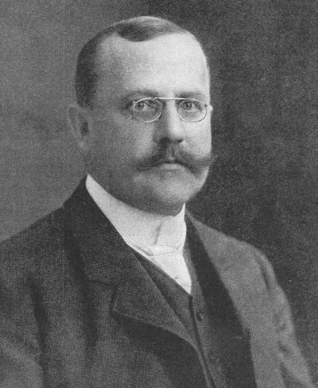 Elof LIndström (1863-1924) på omslaget av Hvar 8 Dag 1909